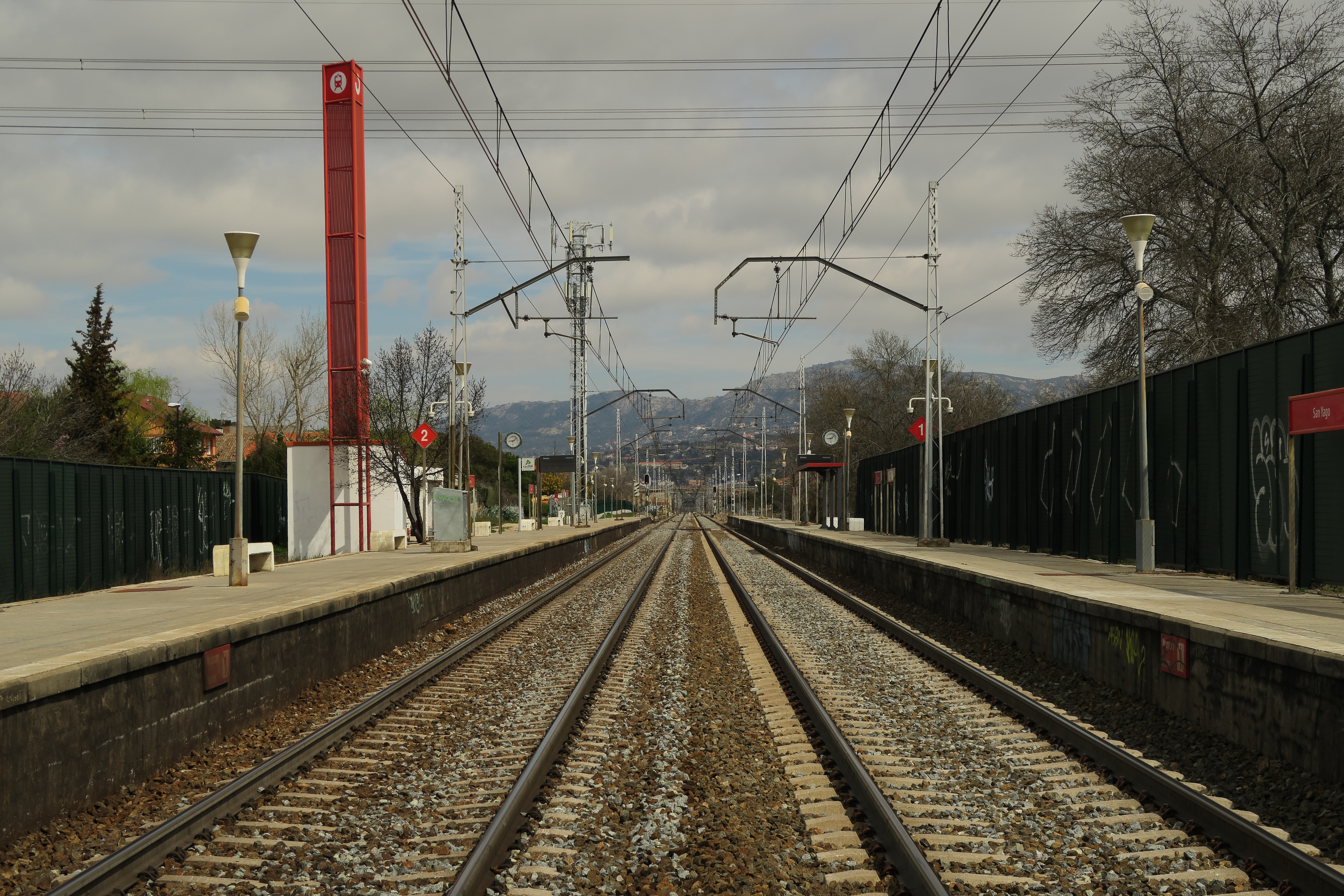 Estación de San Yago